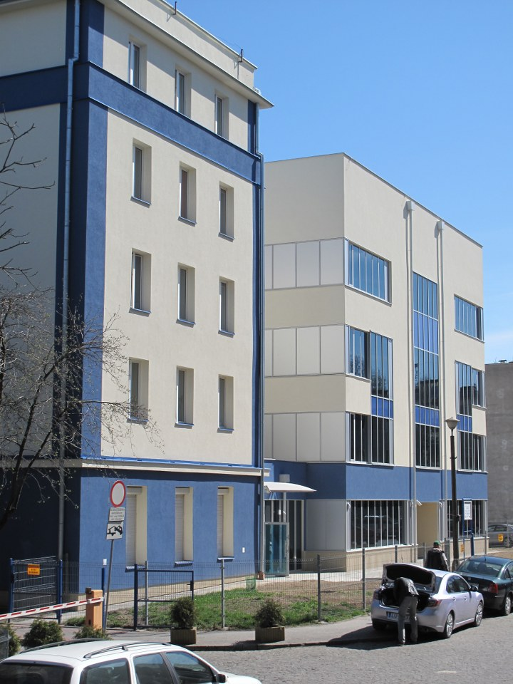 Lublin WSEI